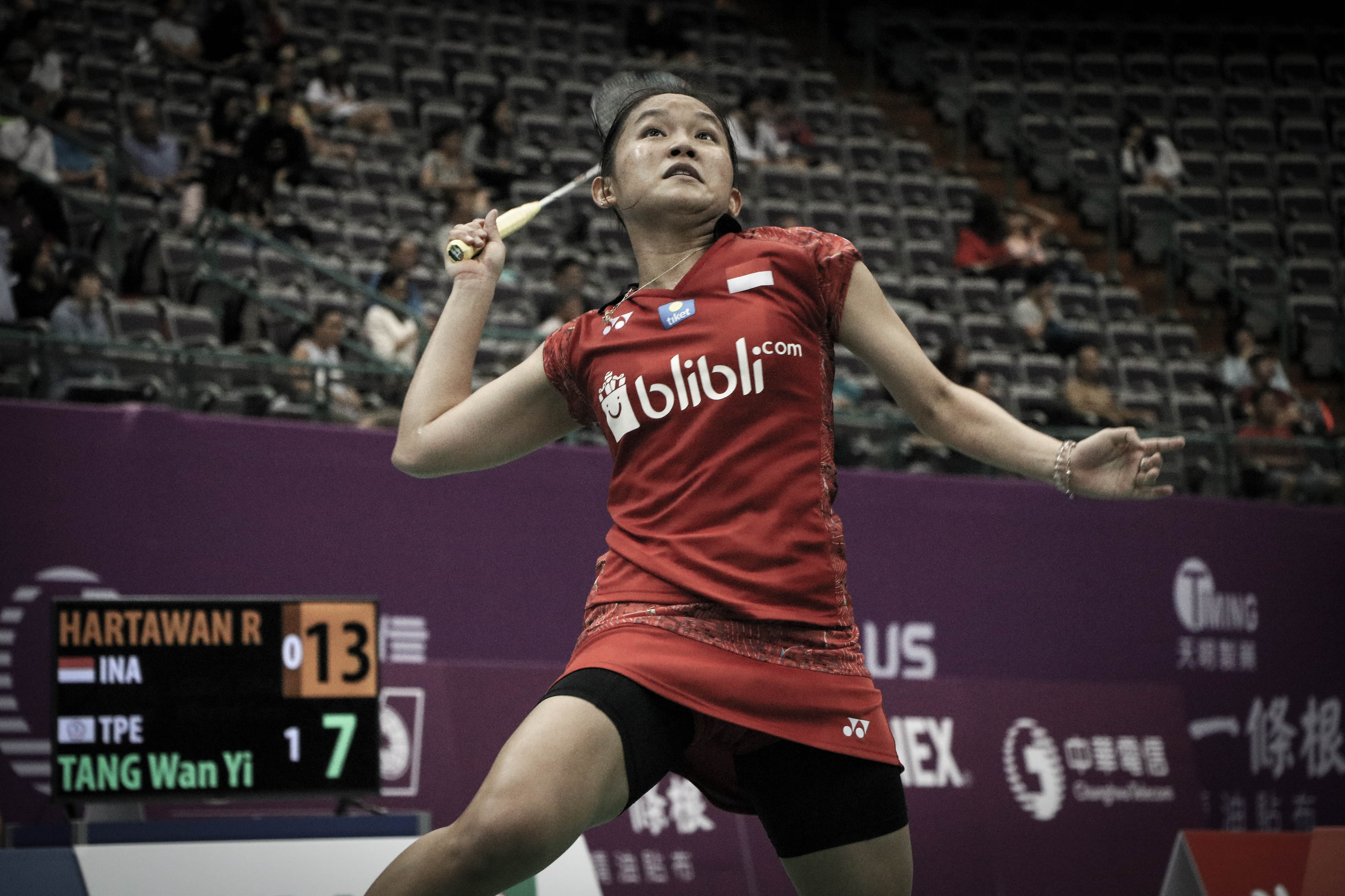 2018 台北OPEN 10/03